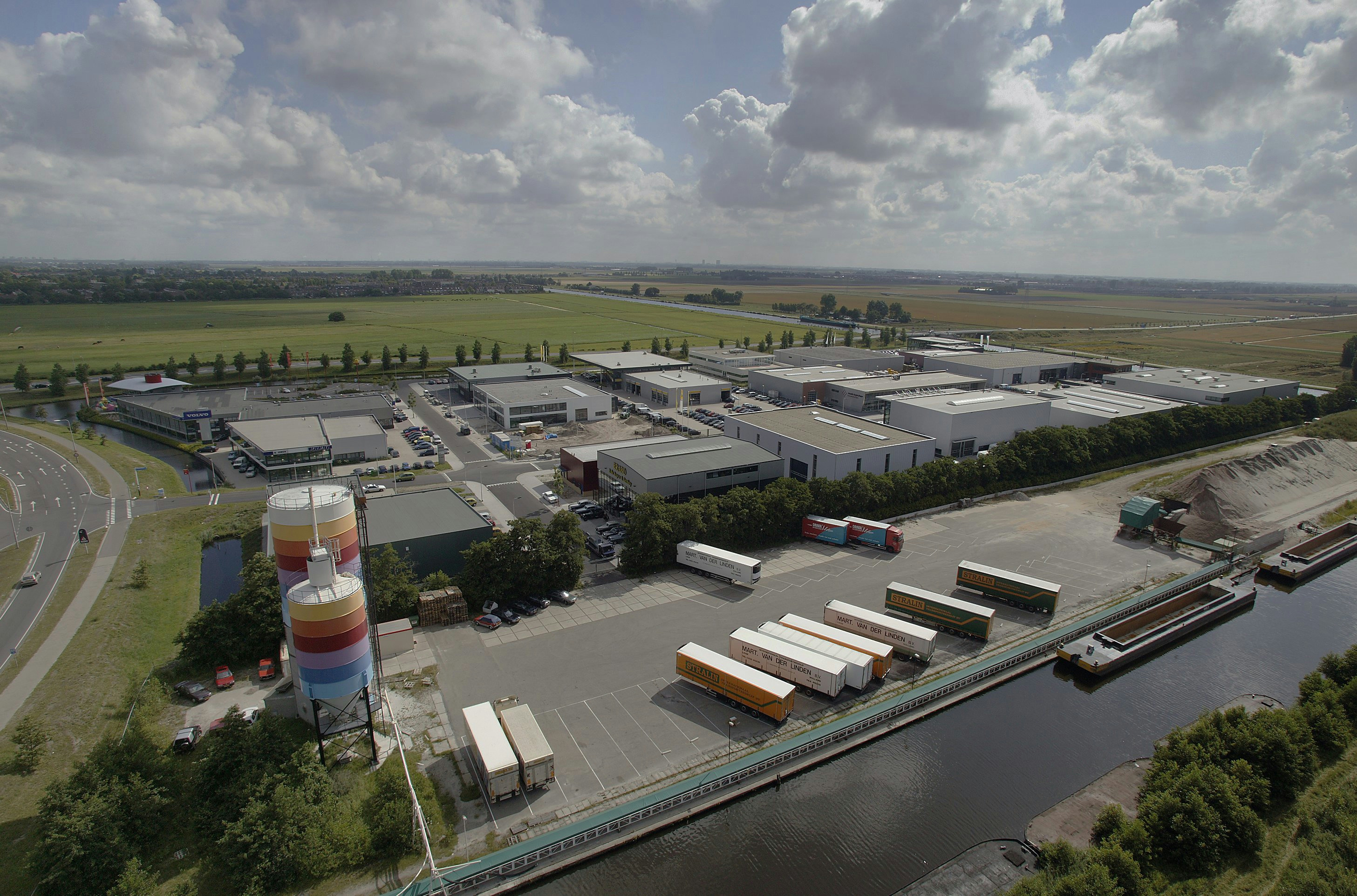 Cultuurlandschap: Industrieterrein, gezien vanaf de watertoren